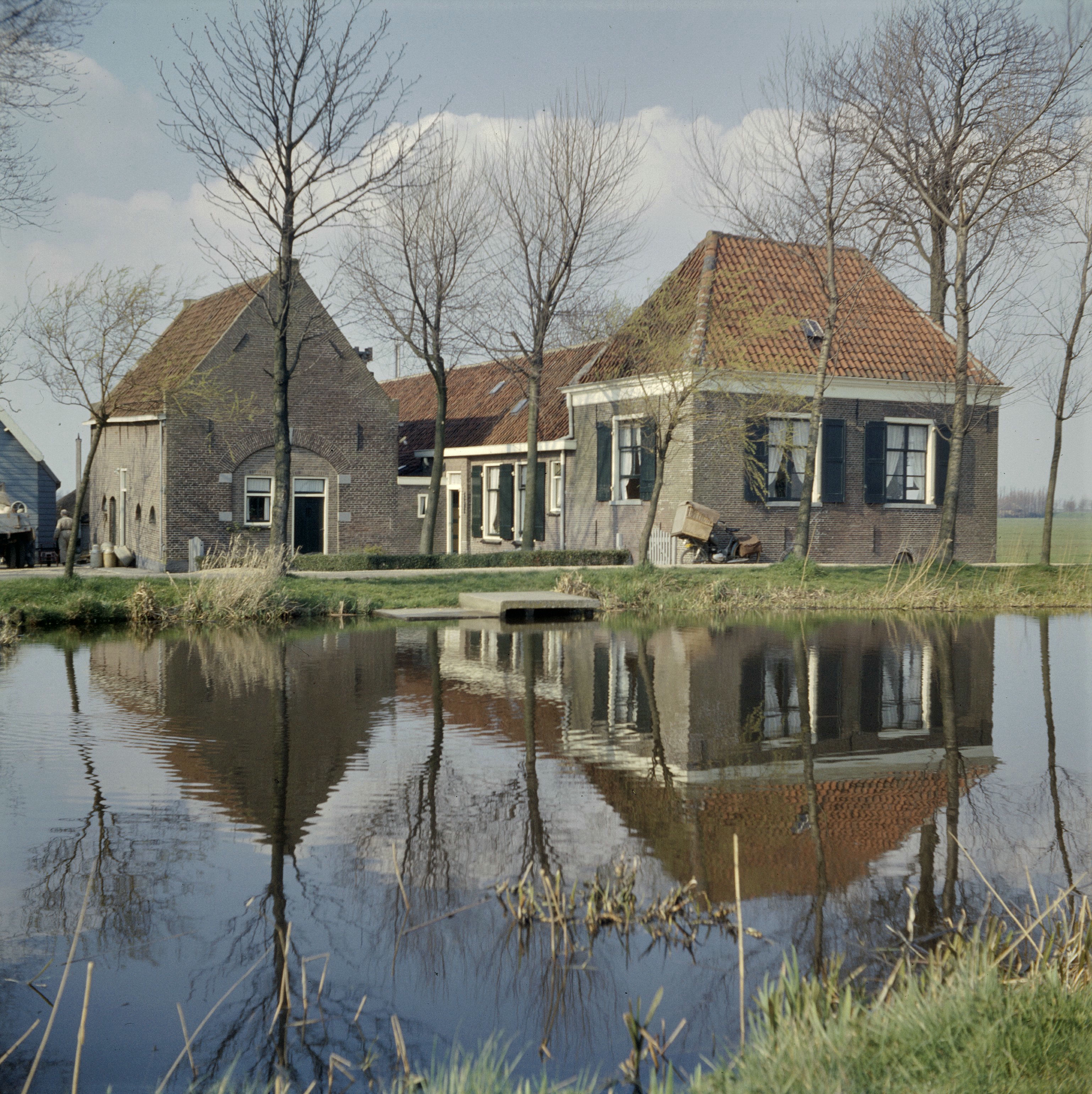 Boerderijen: Overzicht boerderij, Bijlmerringsloot Gaasperdam